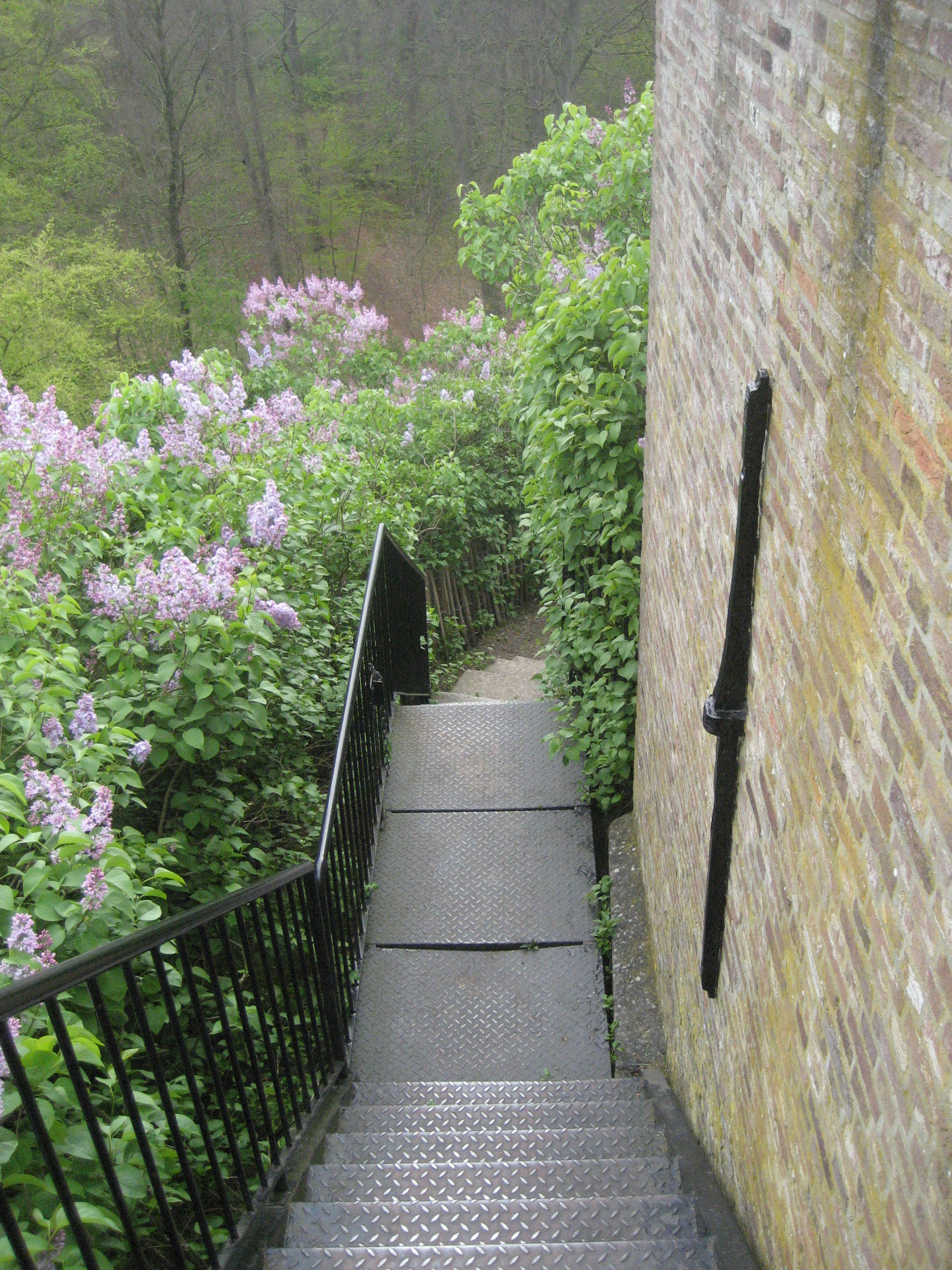 Landgoed De Horsten, Wassenaar/Voorschoten. Seringenberg